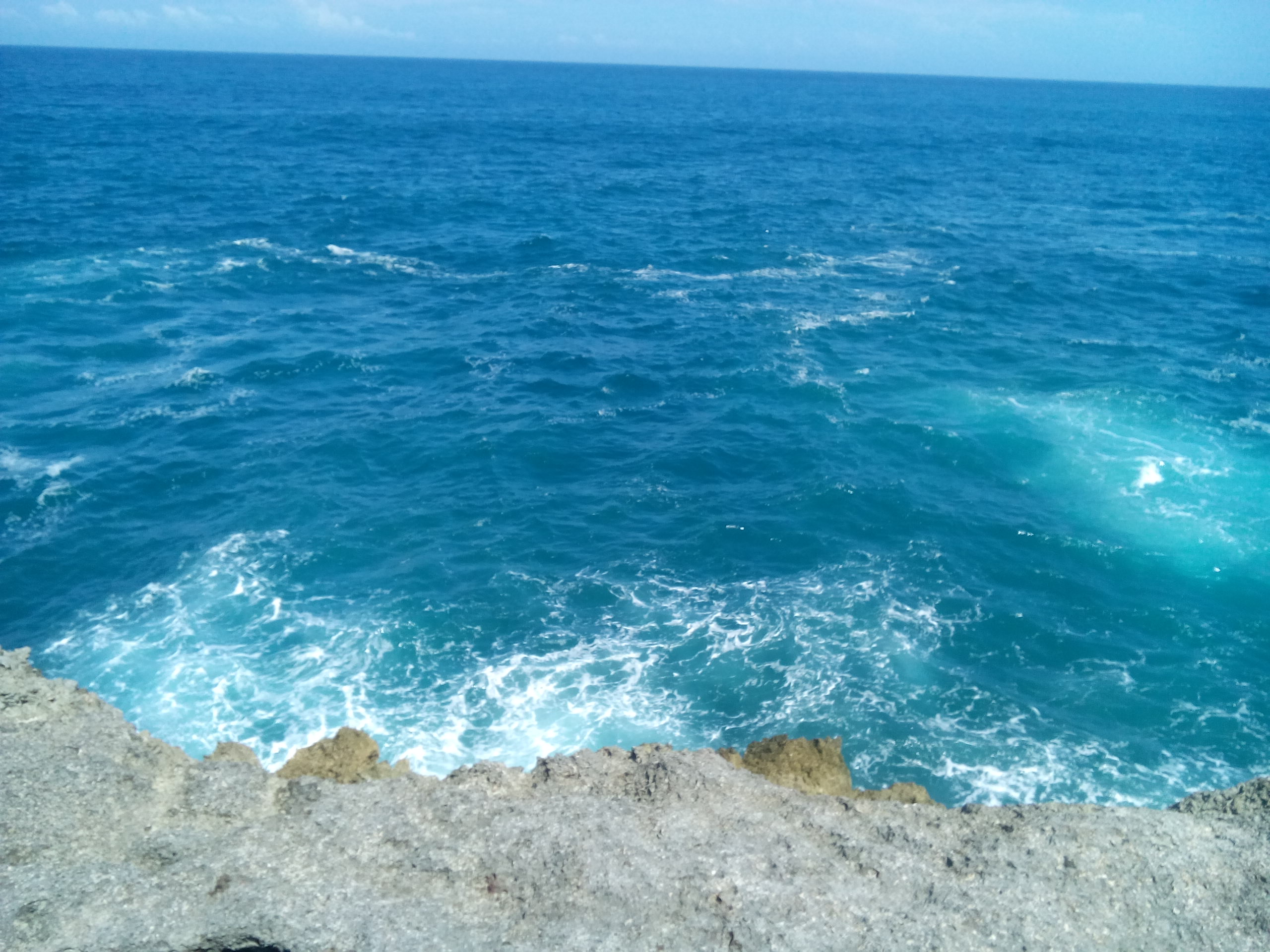 Basa Jawa: segara kidul sinawang saka watu padas ing pantai